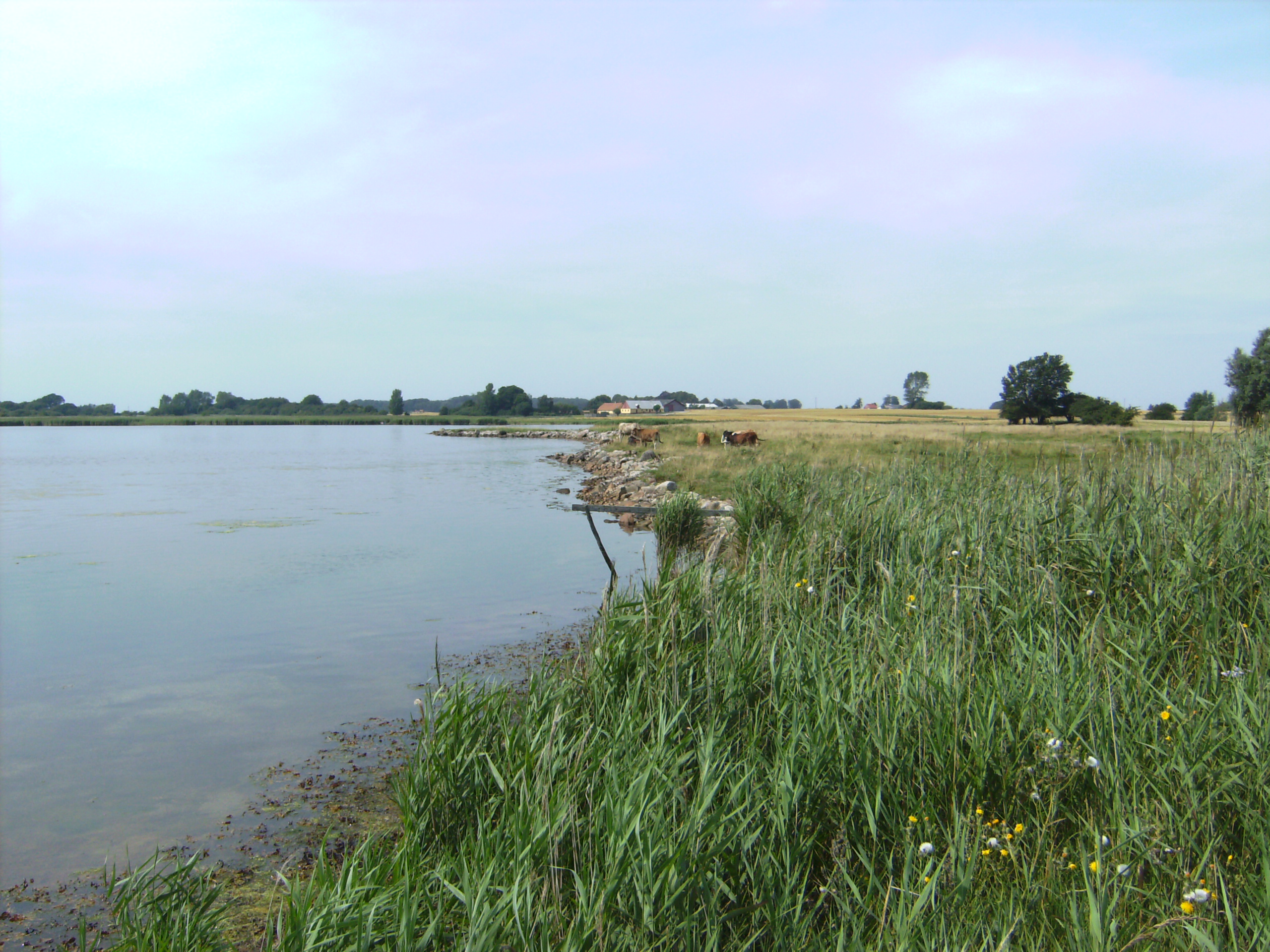 Billeder fra Herritslev Nor og Herritslev Mose vest for Nysted Pictures from the area west of Nysted, Denmark Strandeng ved Hertislev Nor